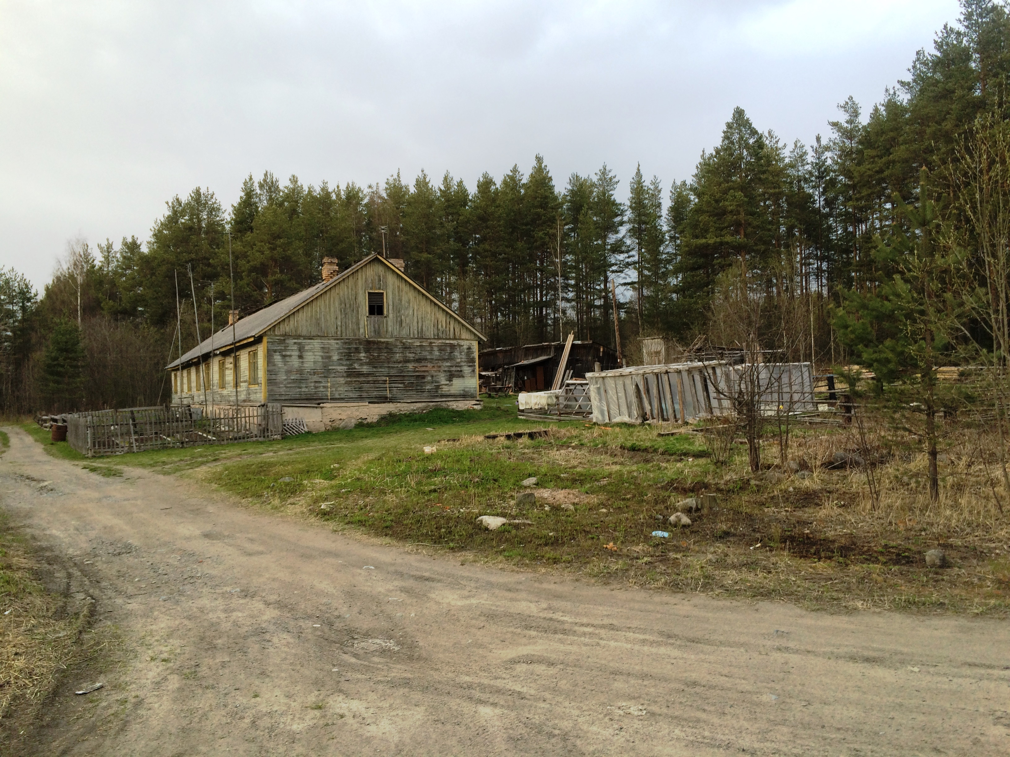 Пст Заделье